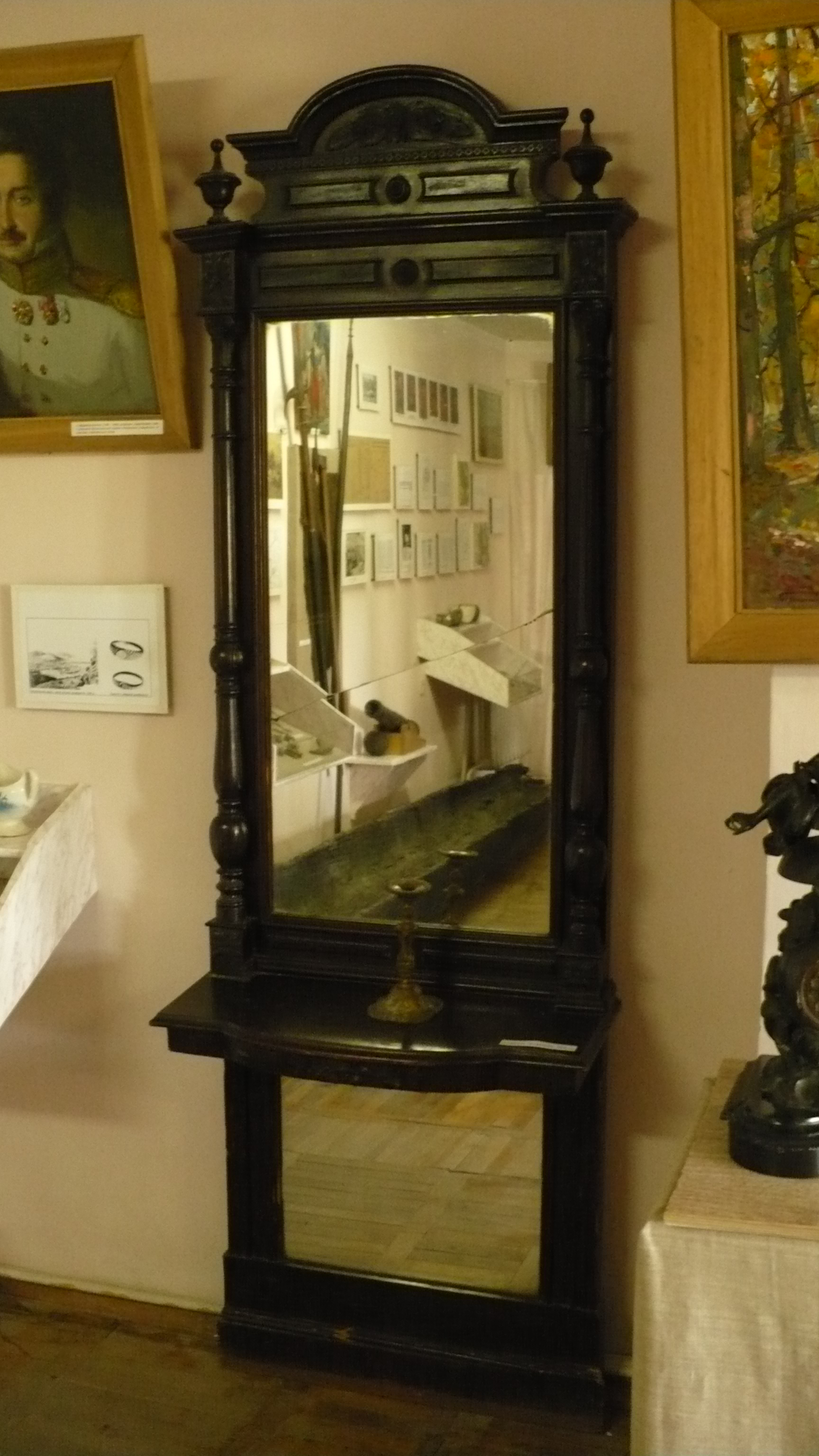 Миргородський Краєзнавчий музей (усередині 27). Внутрішній вигляд Миргородського Краєзнавчого музею